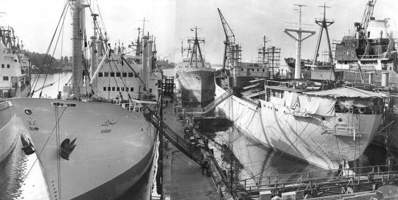 Zentralbild-Mellahn 26.8.1960 Mel-Fr. Die Ostseeküste ein bedeutendes Schiffbauzentrum. Zu einem der bedeutendsten Schiffbauzentren des sozialistischen Lagers hat sich die Ostseeküste der DDR mit den vier Hochseewerften in Warnemünde, Rostock, Wismar und Stralsund entwickelt. Hinzu kommen 11 mittlere und kleine Schiffbaubetriebe an der Küste und im Binnenland. Auch die jetzt 110 Jahre alte Ostseewerft "Neptun" in Rostock erlebte nach 1945 einen stürmischen Aufschwung, waren es unter kapitalistischen Bedingungen im Höchstfalle 3 000 Beschäftigte so sind es jetzt weit über 8 000. In diesem Jahr wollen die Werktätigen 29 Handels- und Spezialschiffe - das sind 6 mehr als im Vorjahr - an ihre Auftraggeber ausliefern. Es werden vorwiegend 4 500 Tonnen Frachter für den Export in die Sowjetunion gebaut. UBz: Die beiden 999 Tonnen Frachter "Bloudan" und "Helwan" sind für die VAR bestimmt."